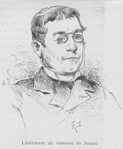 Portrait de Gabriel Lespinasse de Saune alors qu'il est lieutenant de vaisseau et membre de l'État-Major du Ministre de la Marine le Vice-Amiral Peyron